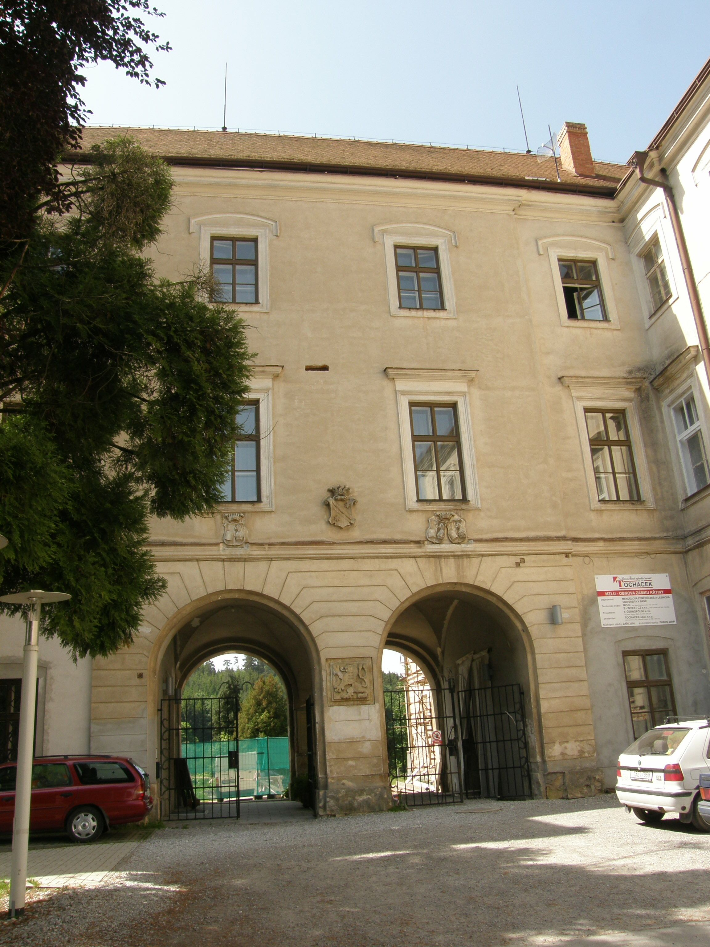 Zámek Křtiny